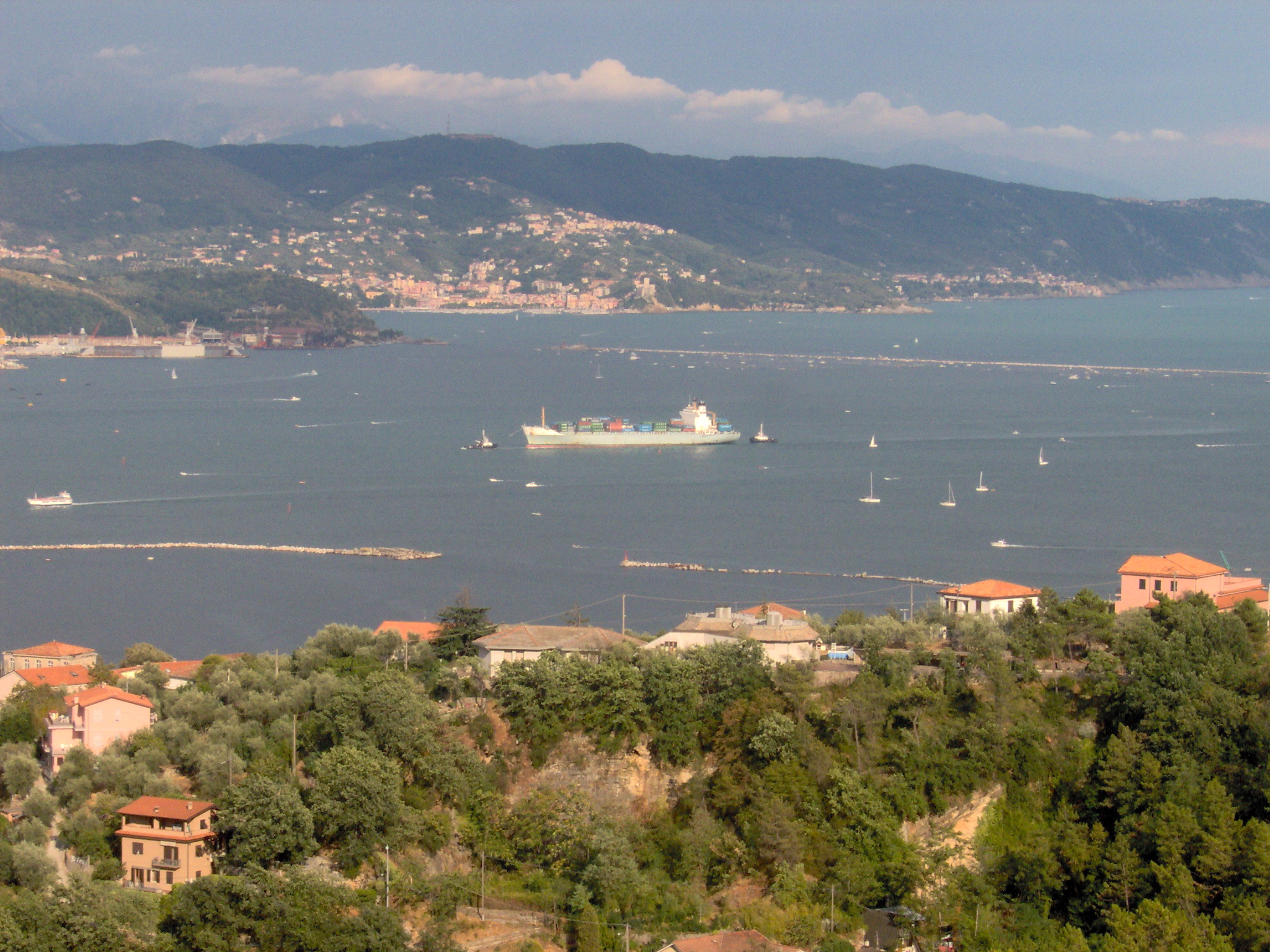 Nave trainata in porto. Muggiano, Lerici, promontorio Montemarcello, Monte Caprione.